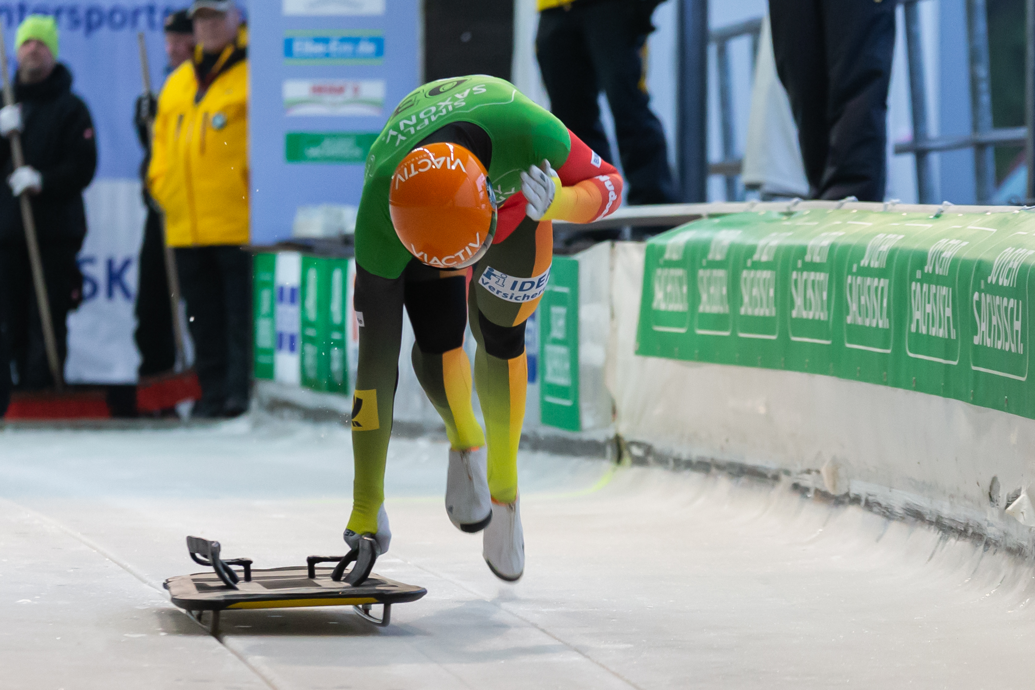 Deutsche Meisterschaften Skeleton; Axel Jungk (BSC Sachsen Oberbärenburg) beim Start